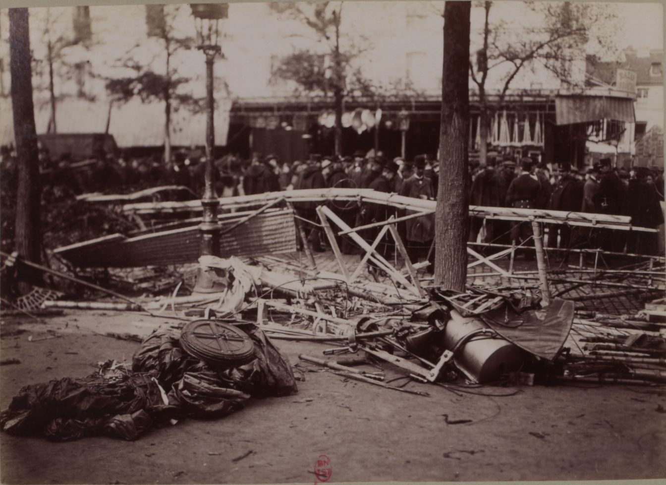 Les débris du ballon dirigeable Pax tombé avenue du Maine.